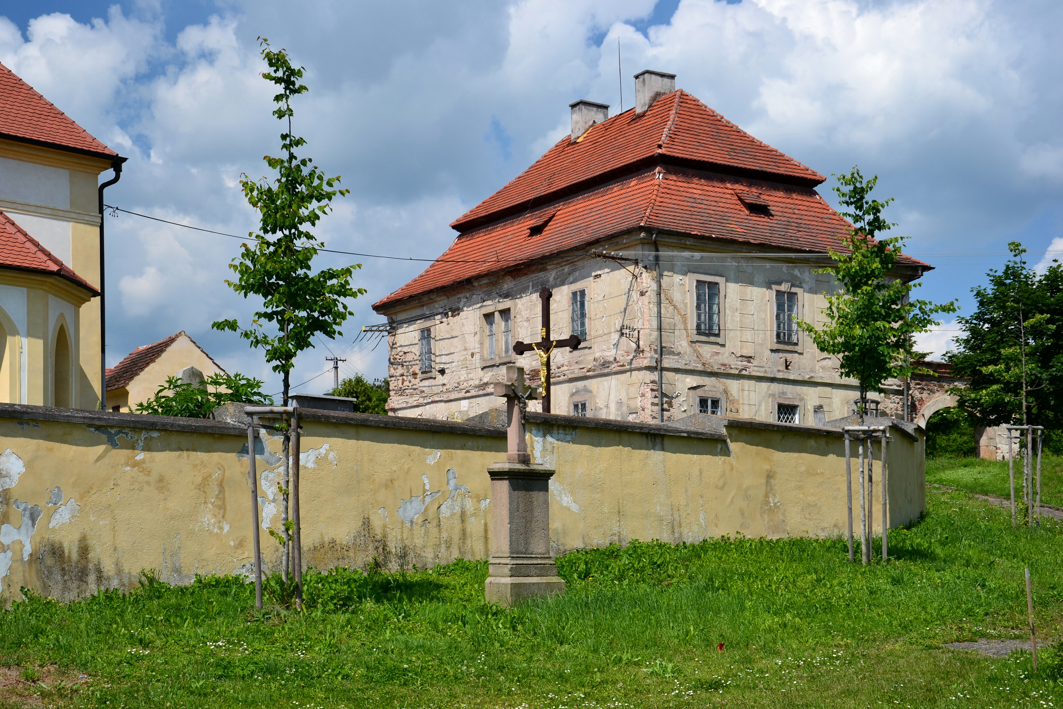 Fara (Žebnice), Žebnice 1